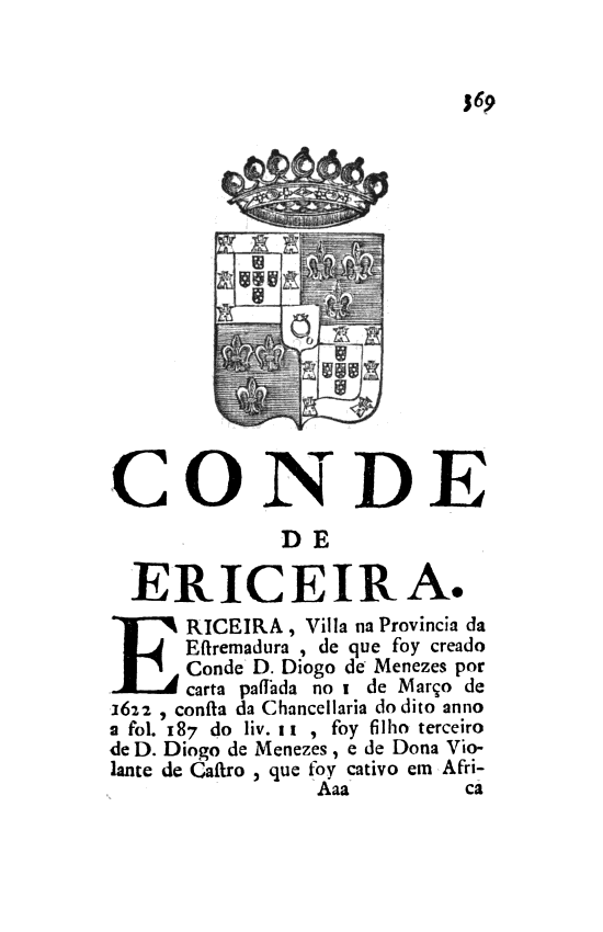 Página 369 das "Memorias Historicas e Genealogicas dos Grandes de Portugal" ― Condes de Ericeira.